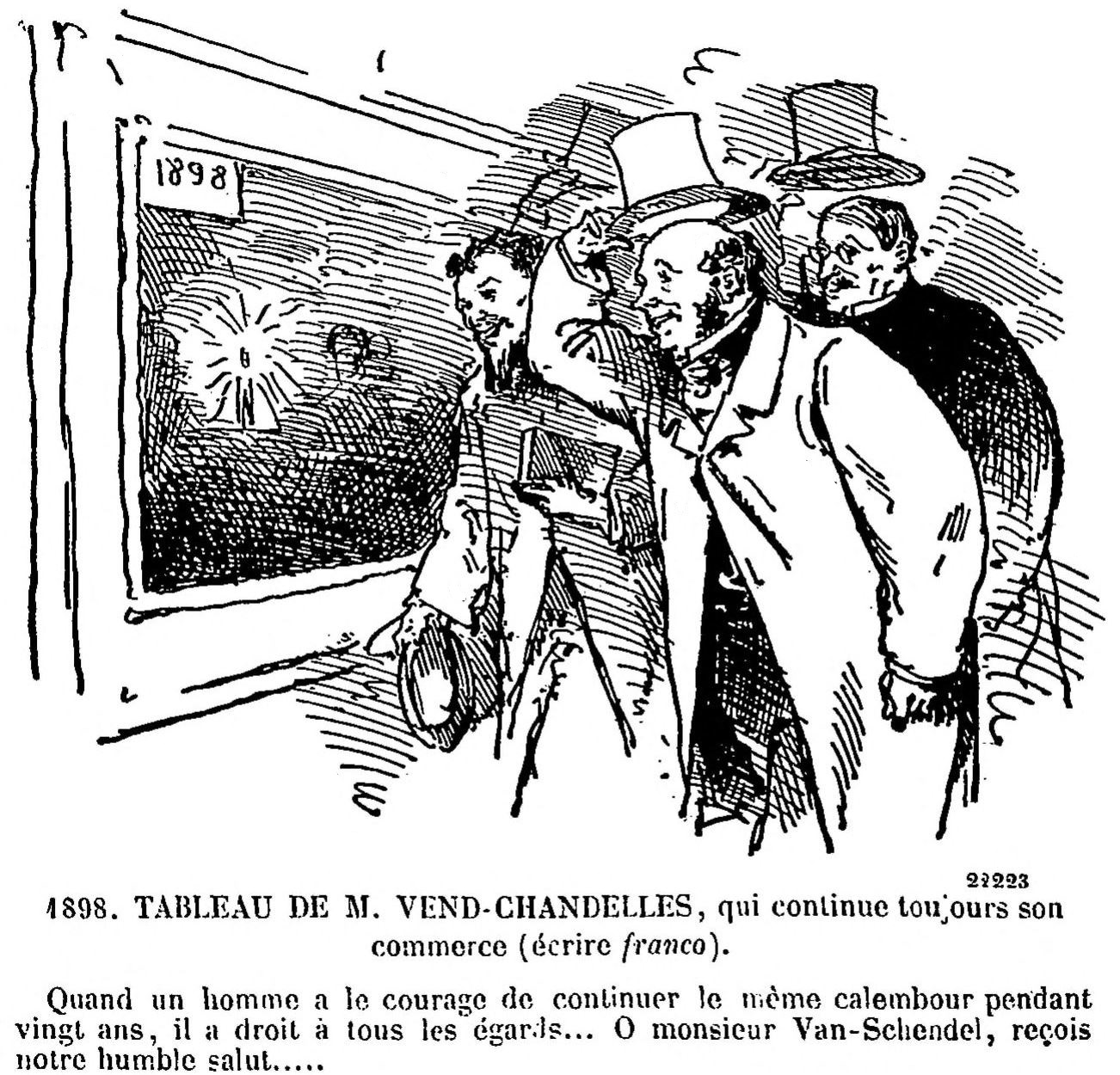 Extrait de la planche : "Promenades au Salon de 1864 - par Bertall (suite)".